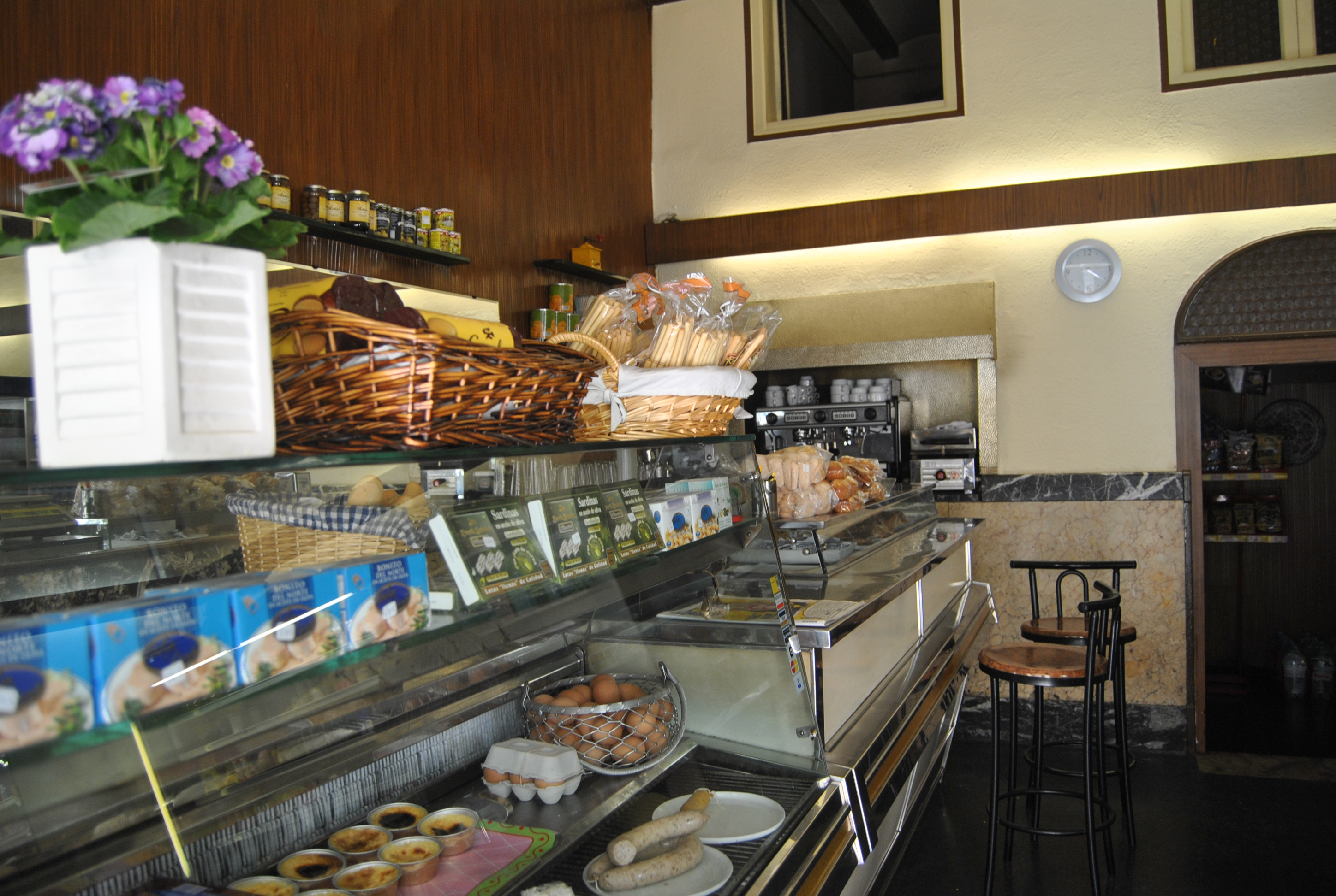 Interior de la Granja Vendrell